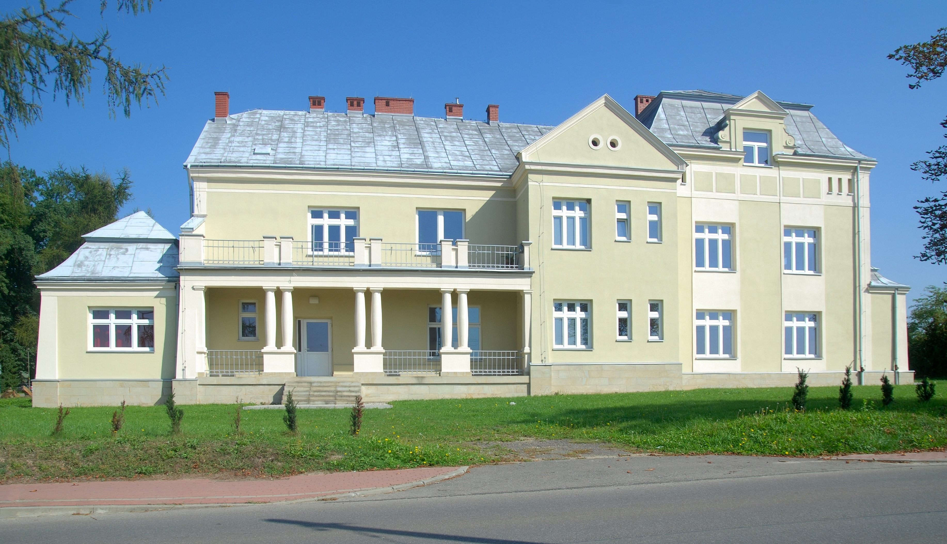 wieś Korczyna (województwo podkarpackie)